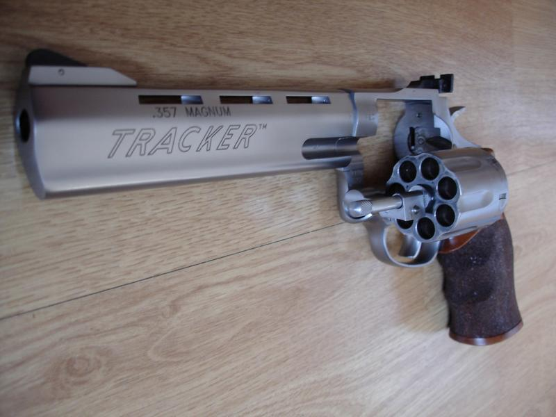 Taurus 627-KLM .357MAG (TRACKER)